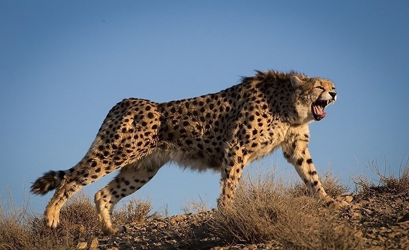 Iranian Cheetah